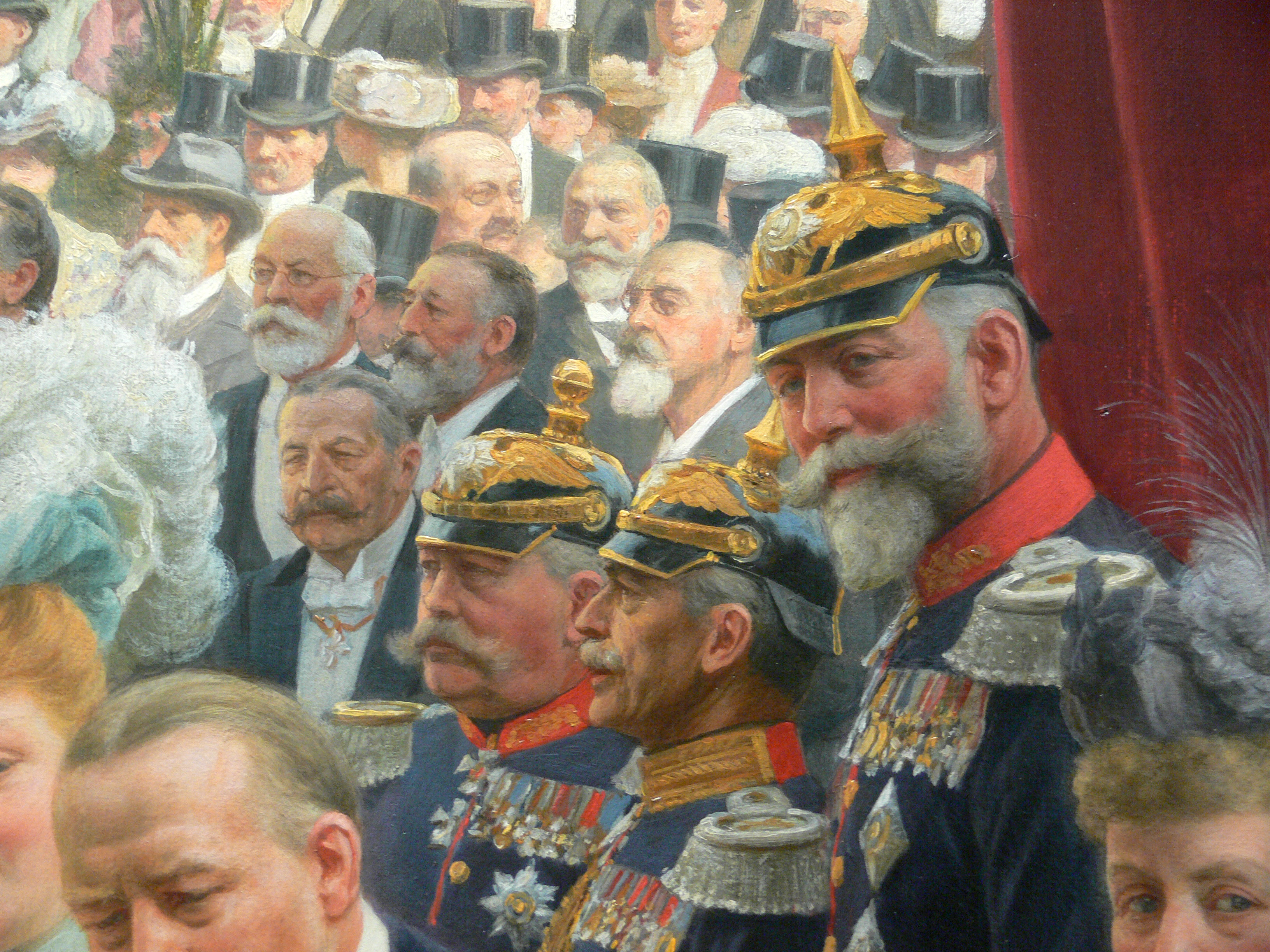 Anton von Werner: Enthüllung des Richard-Wagner-Denkmals im Tiergarten, Öl auf Leinwand, 1908 Berlinische Galerie Native nameBerlinische GalerieLocationBerlinCoordinates52° 30′ 15″ N, 13° 23′ 56″ E Established1975, 2004 (moved to present quarters)Website Detail